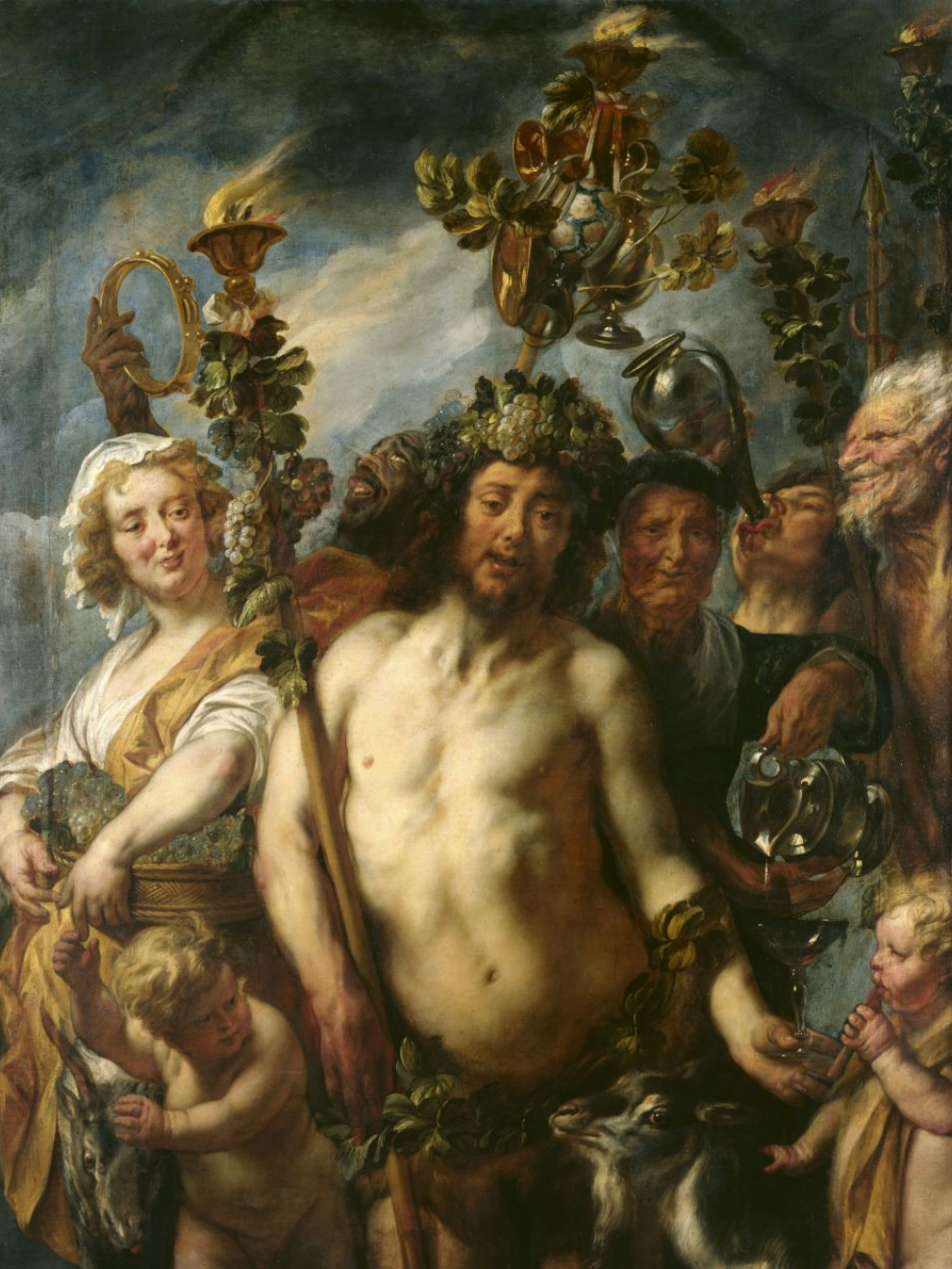 Trionfo di bacco